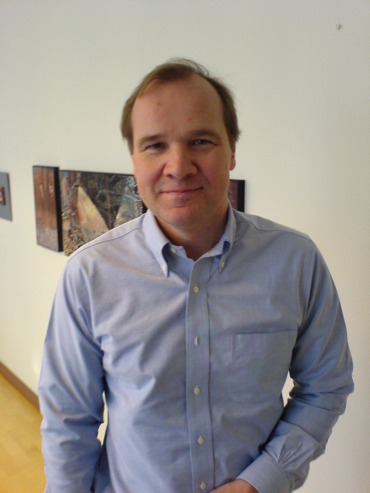 Kommunstyrelsens ordförande i Södertälje; Anders Lago